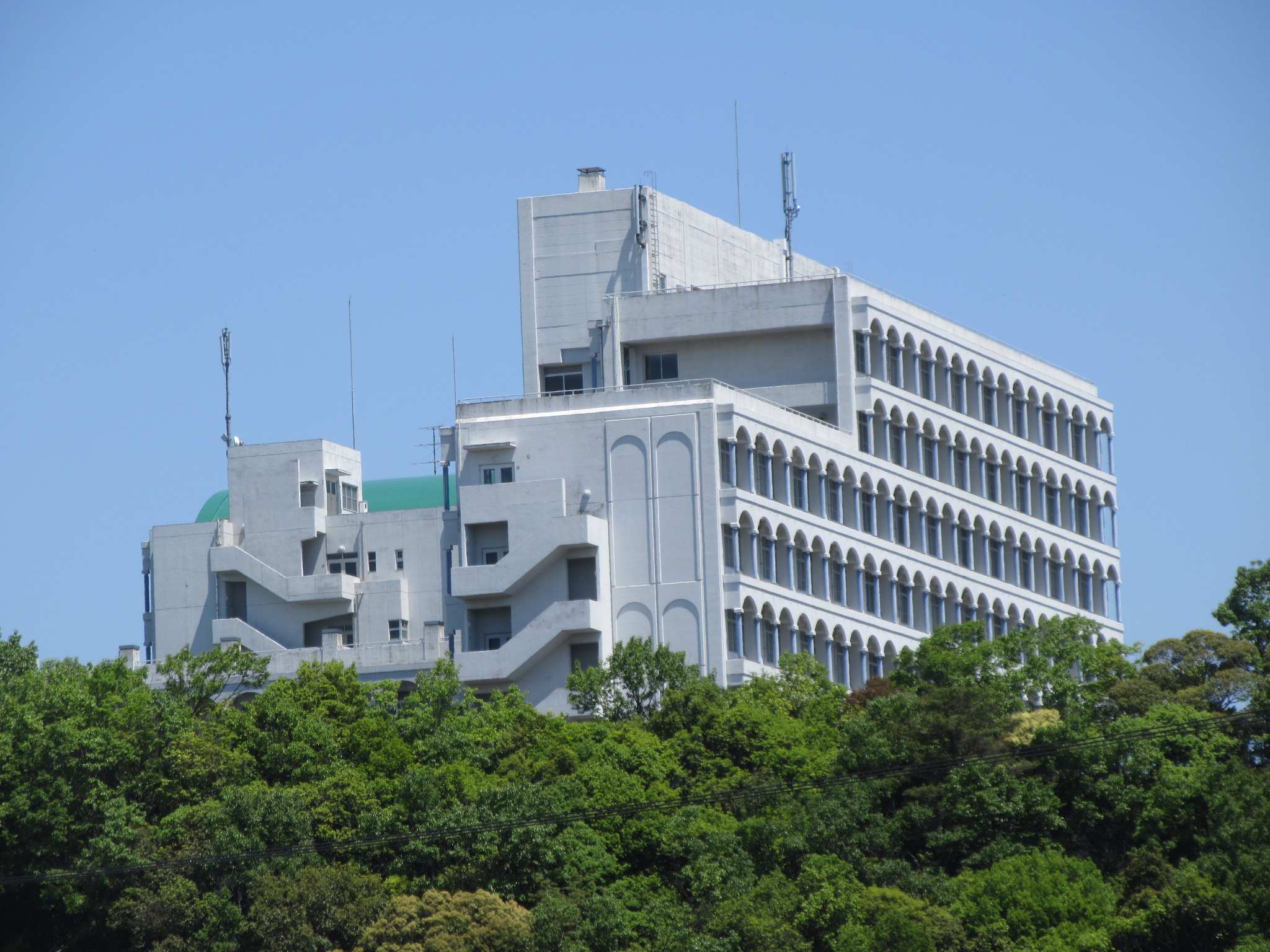 愛知産業大学（岡崎市岡町）